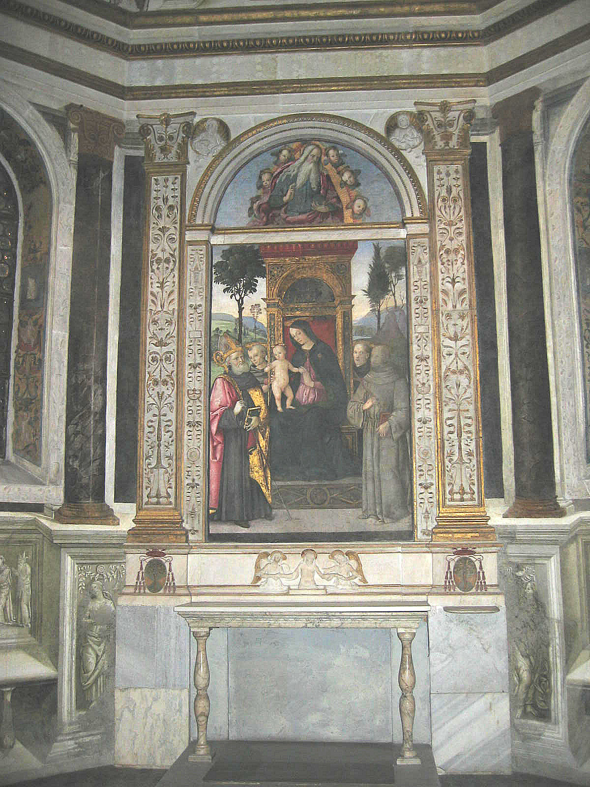 Virgin and Four Saints (1504-1507), Basso della Rovere chapel, Santa Maria del Popolo, Rome. Picture by Torvindus.